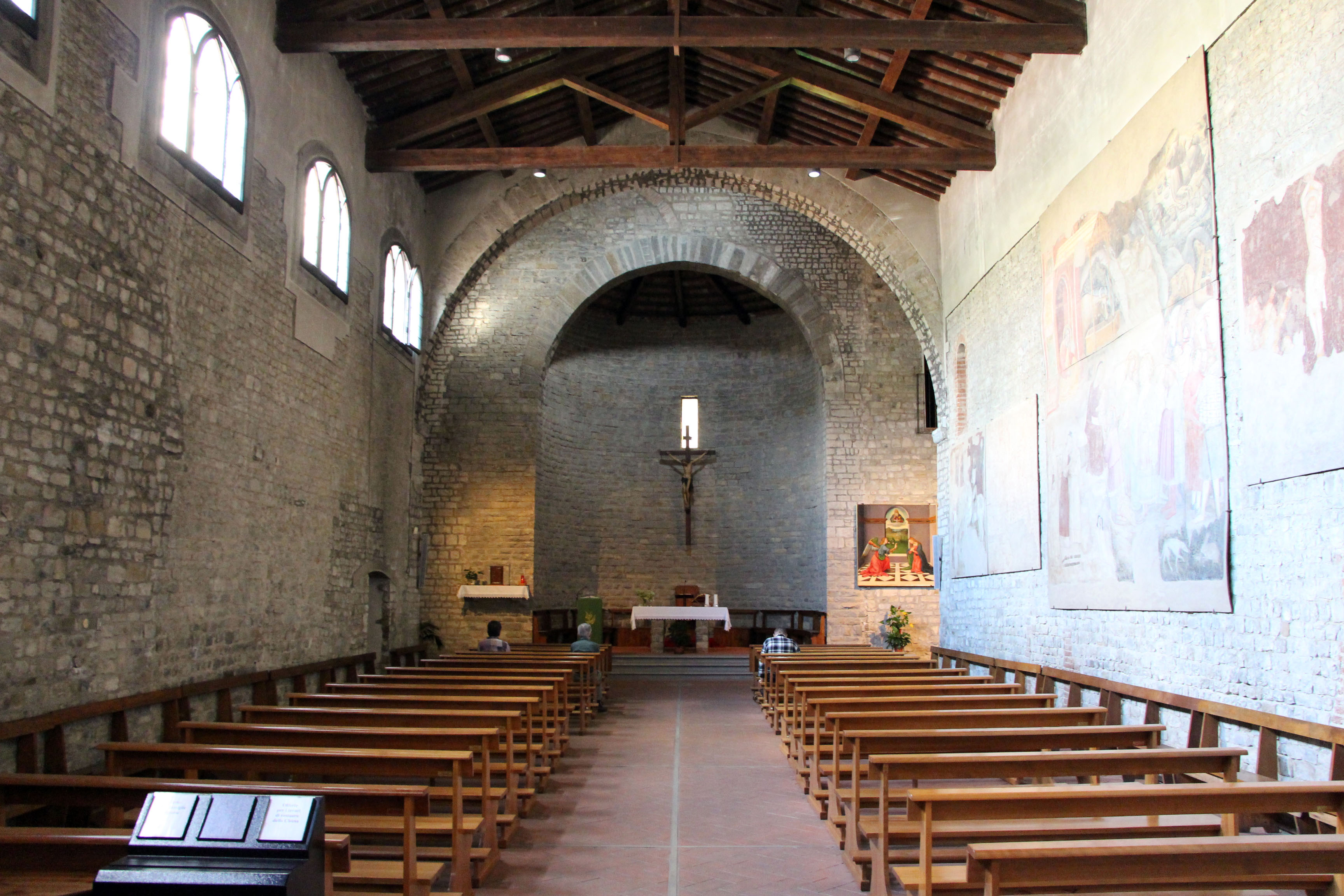 Firenze, vedi nome file